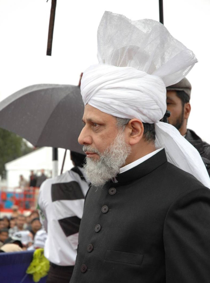 Hadhrat Mirza Masroor Ahmad